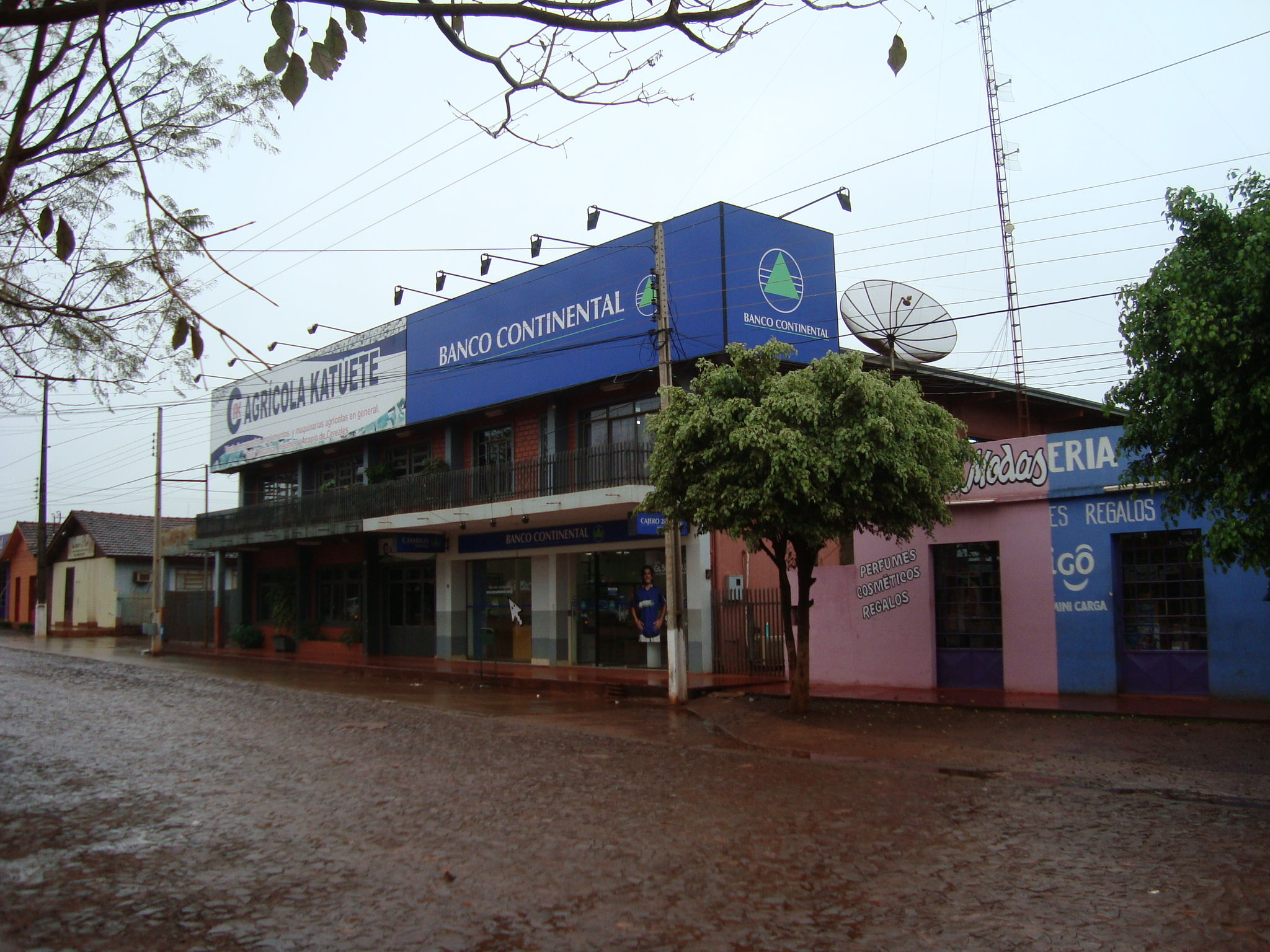 Katuete